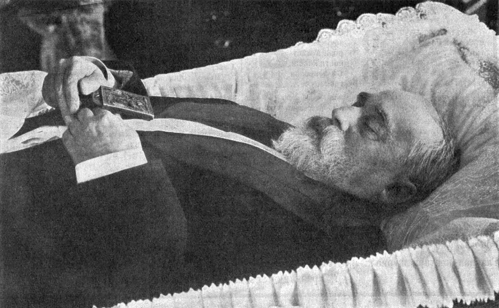 Сергей Андреевич Муромцев в гробу